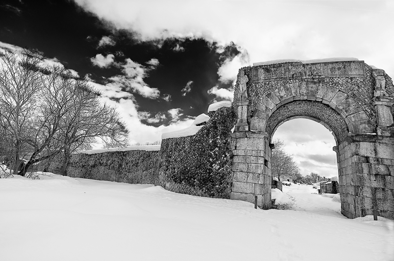 Area archeologica - MIBAC This is a photo of a monument which is part of cultural heritage of Italy.